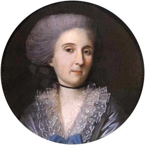 Наталья Владимировна Салтыкова (1737-1812), ур. Долгорукова, жена князя Н.И.Салтыкова.